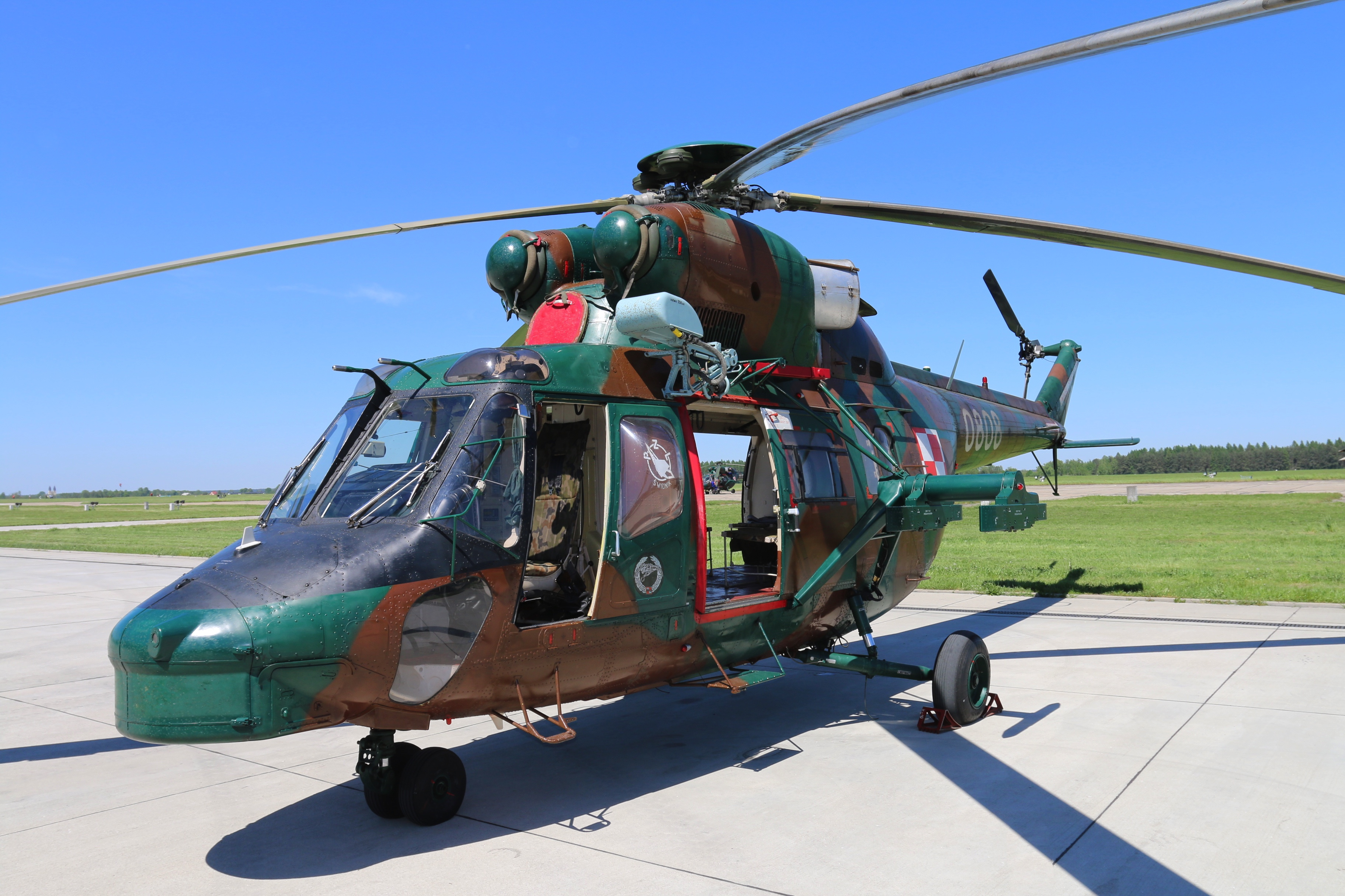 Sokół o numerze bocznym 0808 na lotnisku 7 Dywizjonu Lotniczego w Glinniku